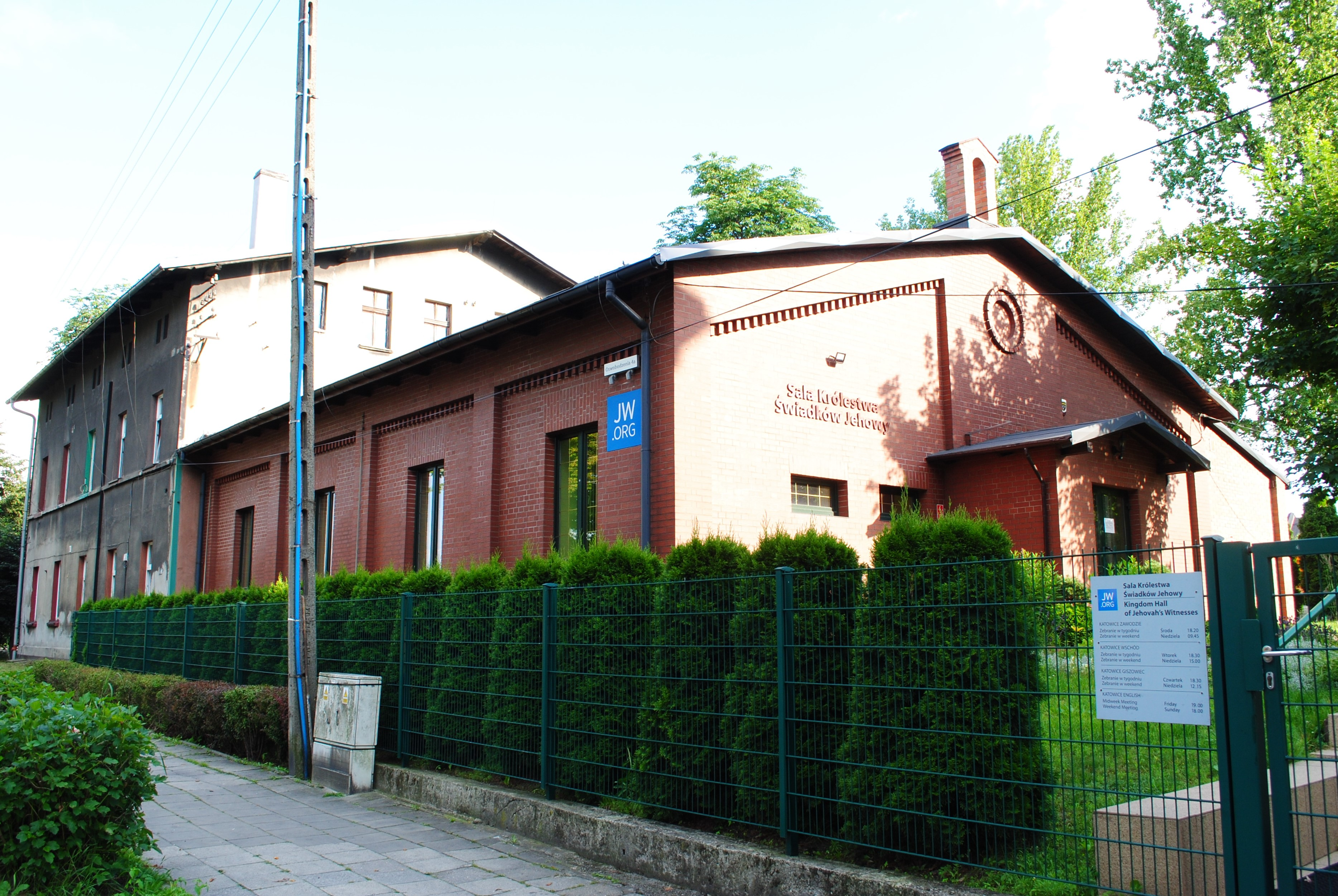 Katowice - Janów-Nikiszowiec. Sala Królestwa Świadków Jehowy przy ul. Oswobodzenia